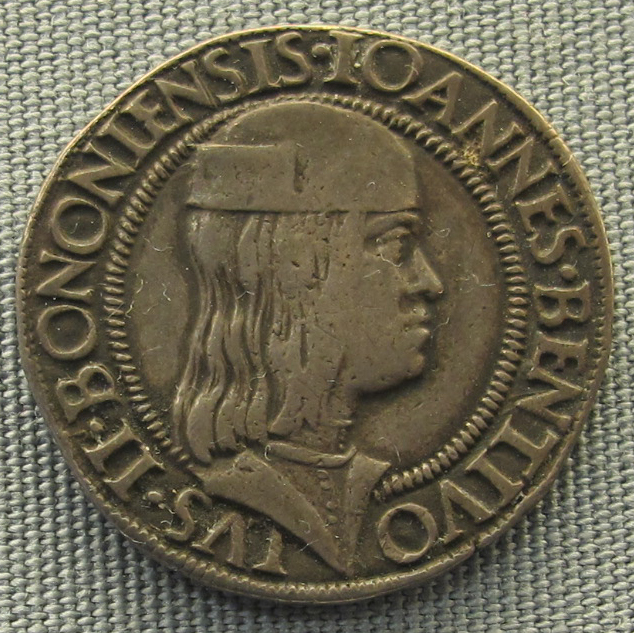 Bologna, testone di Giovanni II bentivoglio, 1463-1506